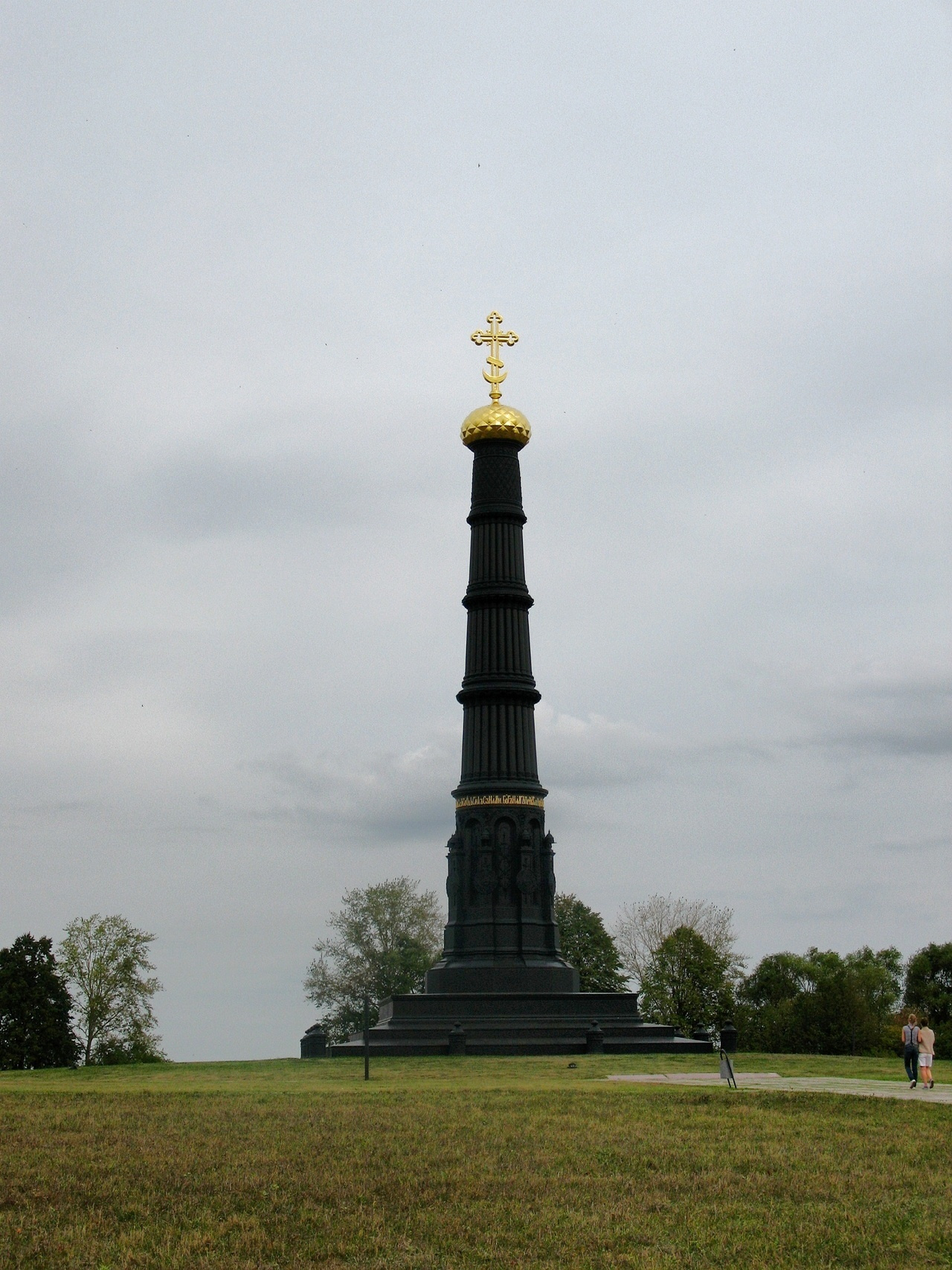 The memorial column on the Kulikovo field was designed by Alexander Brullov in 1848 Куликово поле, памятник в честь победы на Куликовом поле по проекту А. П. Брюллова. 1848